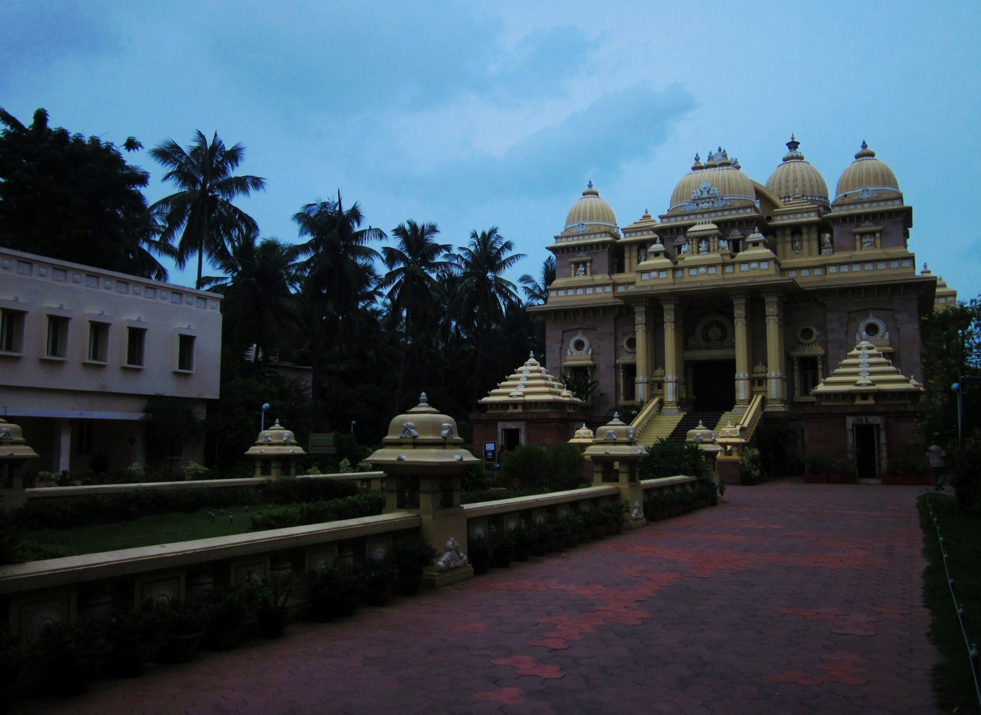 சென்னை மயிலாப்பூரில் உள்ள இராமகிருட்டிணர் மடம்